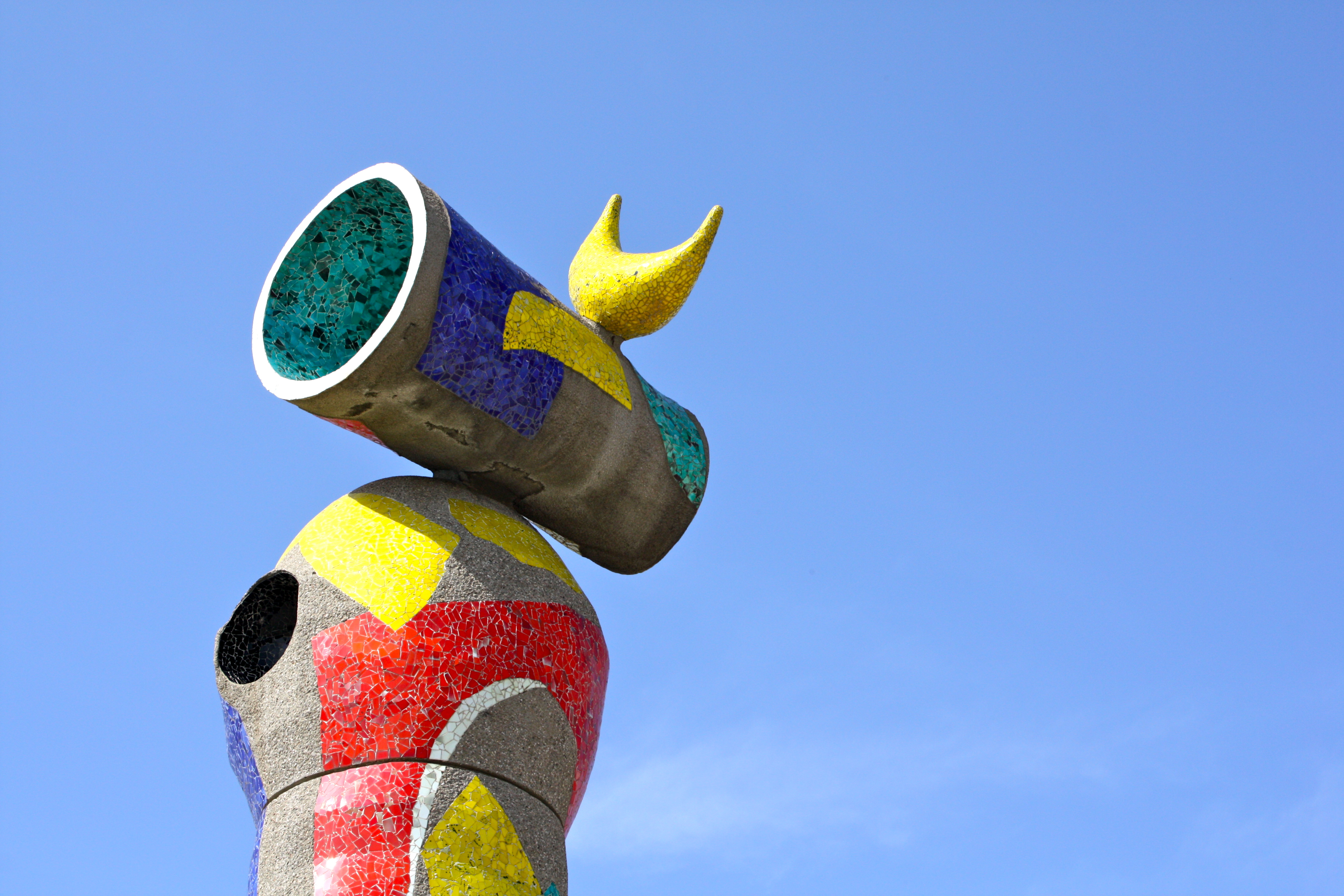 Barcelona Tres - 034